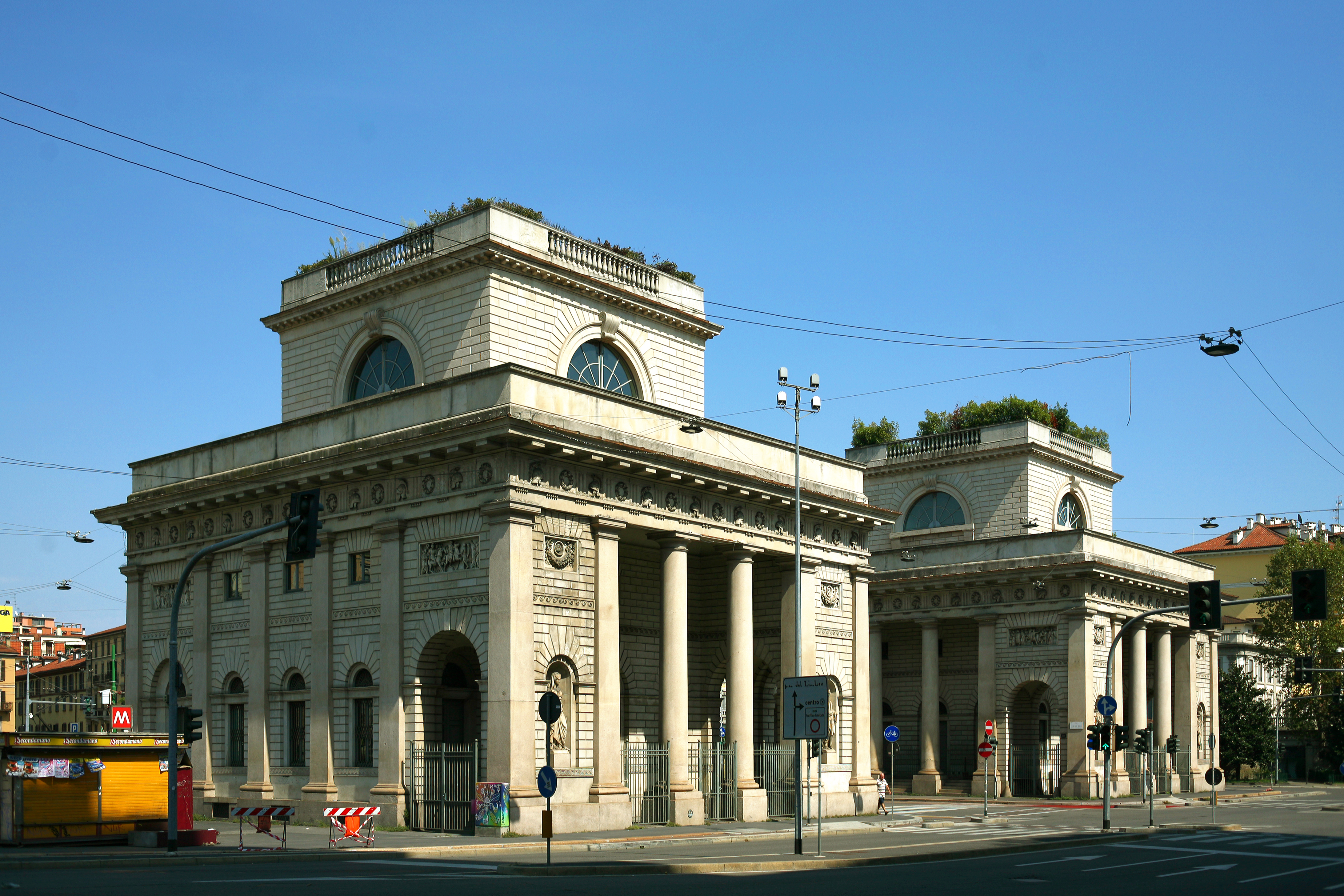 I caselli di Porta Venezia a Milano visti dai bastioni